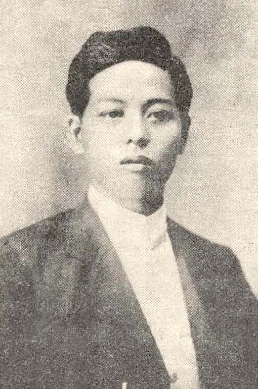 Bân-lâm-gú: 陳鴻鳴 Tân Hông-bêng